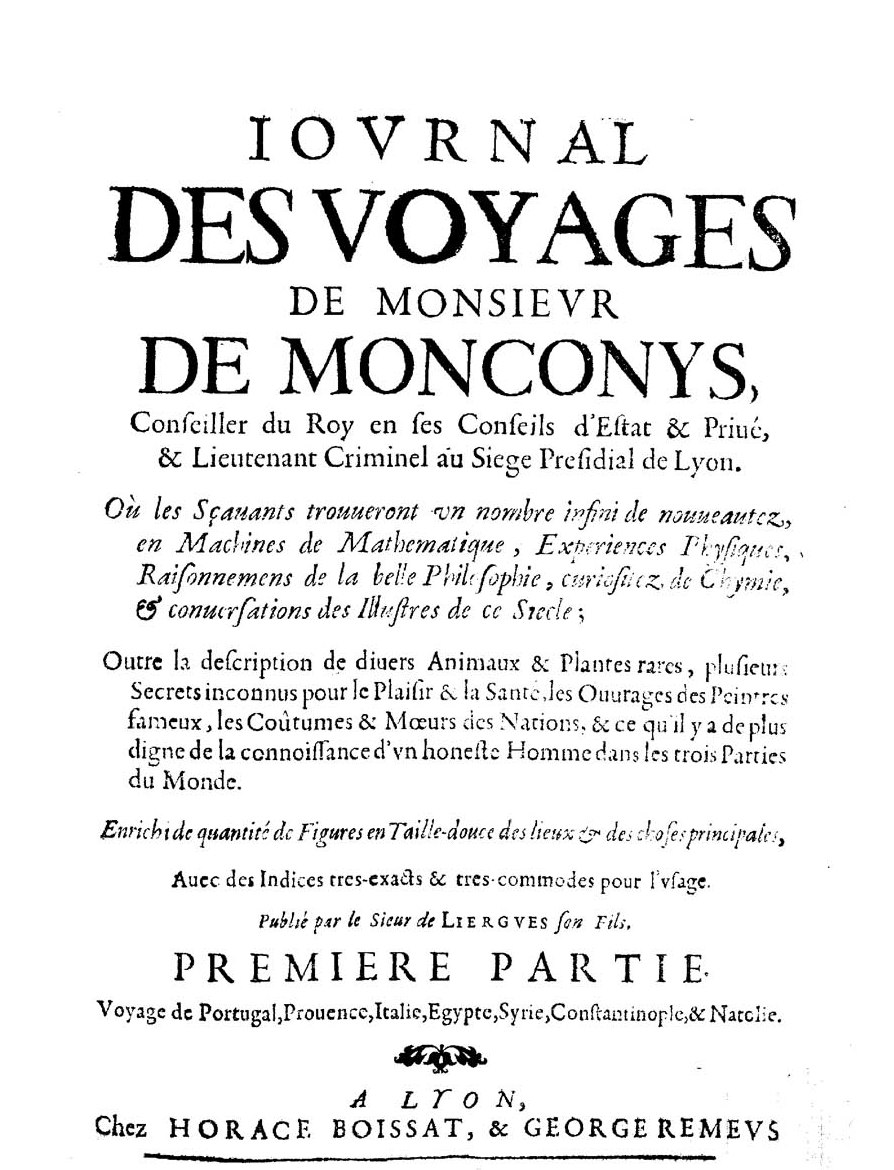 Frontespizio